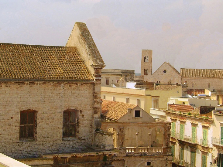 Il mio punto di vista su Bitonto.